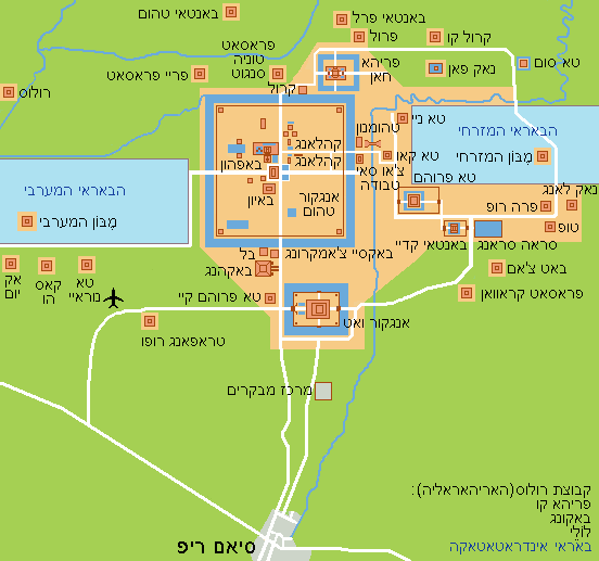 Angkor Wat Map